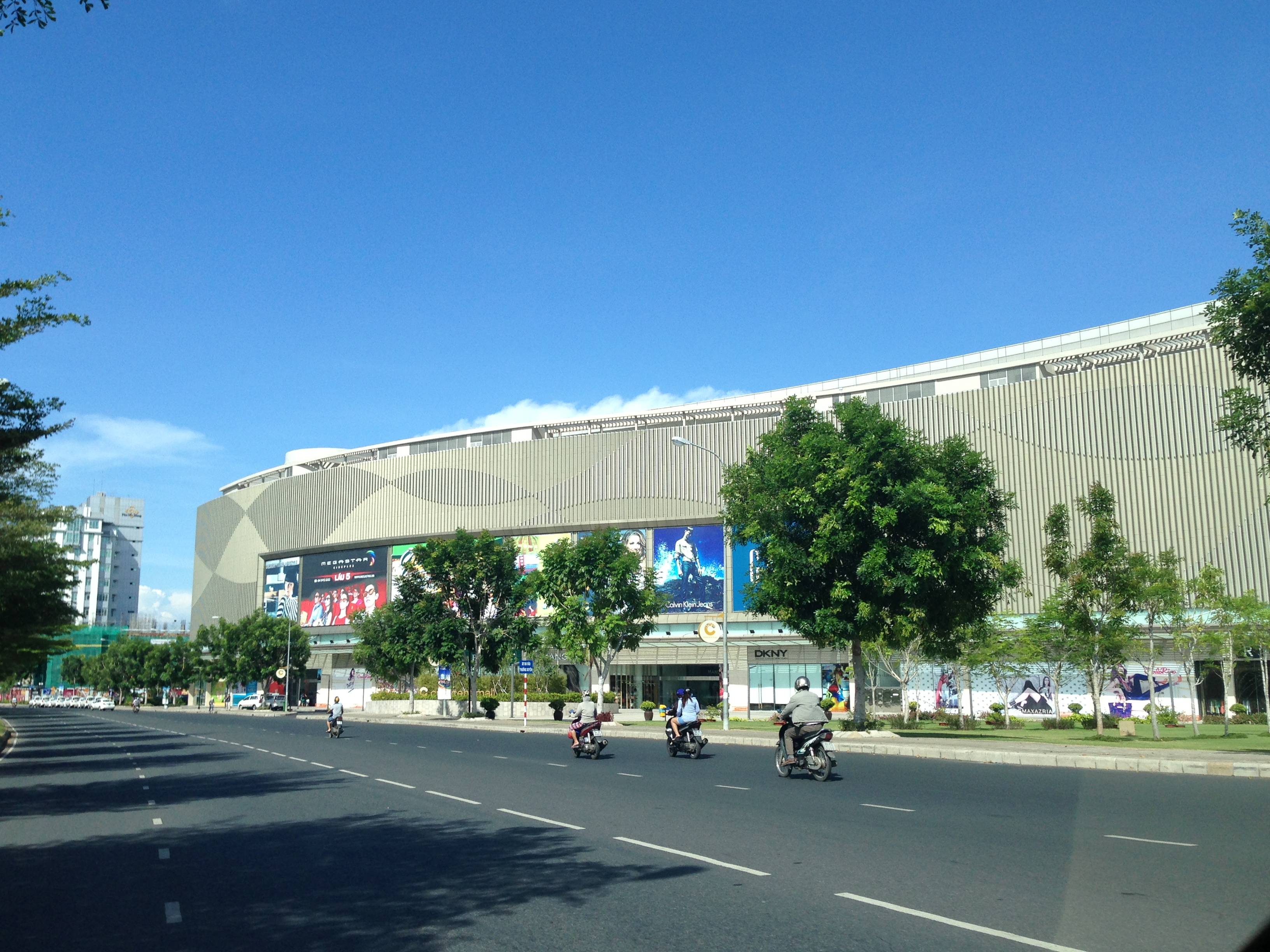 Nguyen van Linh tan phu, q7 hcmvn